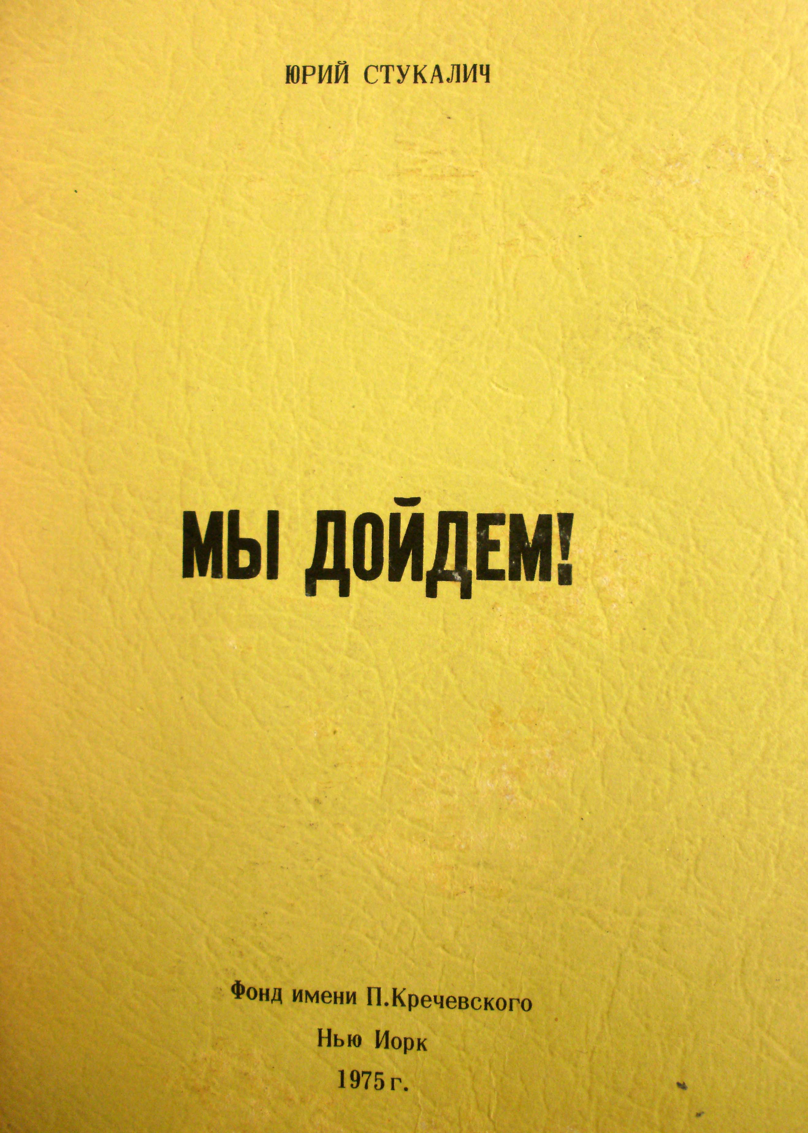 Беларуская (тарашкевіца): Юрка Віцьбіч - Мы дойдзем! Выданьне Фонду Пётры Крачэўскага, Нью-Ёрк